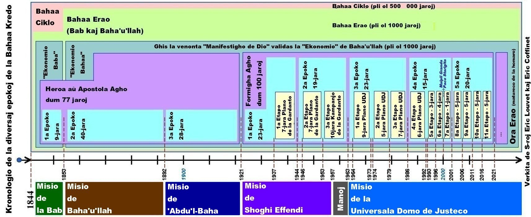 Tabelo pri la diversaj epokoj de la Bahaa Kredo, verkita de Eric.Coffinet Kategorio:Bahaismo